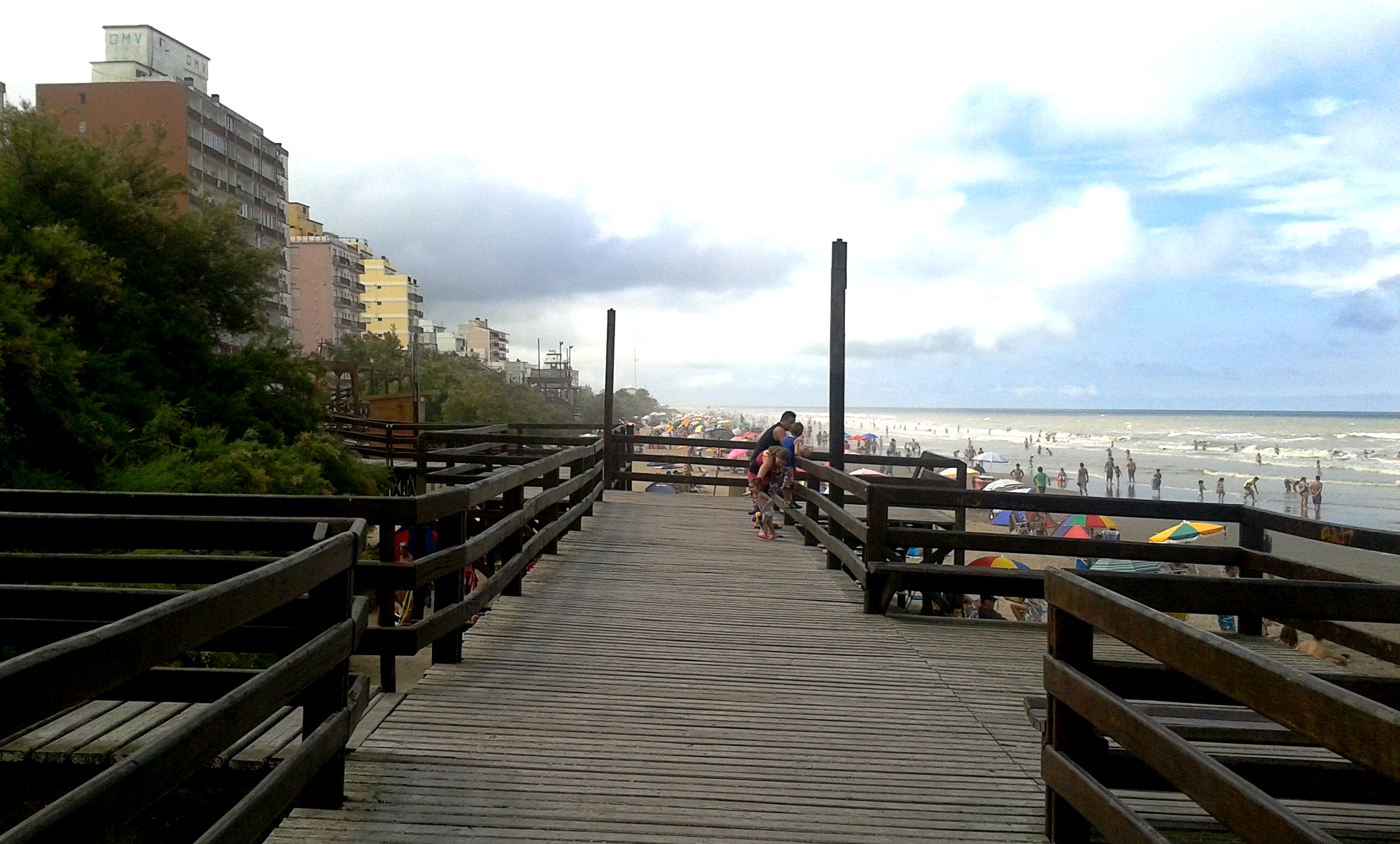 Partido de La Costa, Provincia de Buenos Aires, Argentina